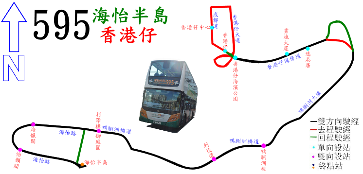 中文（香港）: 新巴595線的走線圖